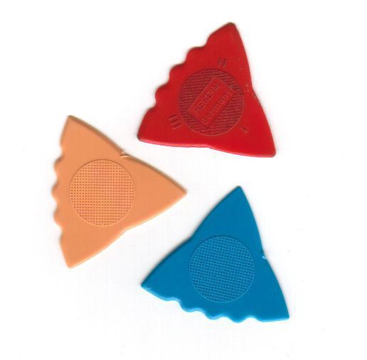 Drei Plektren